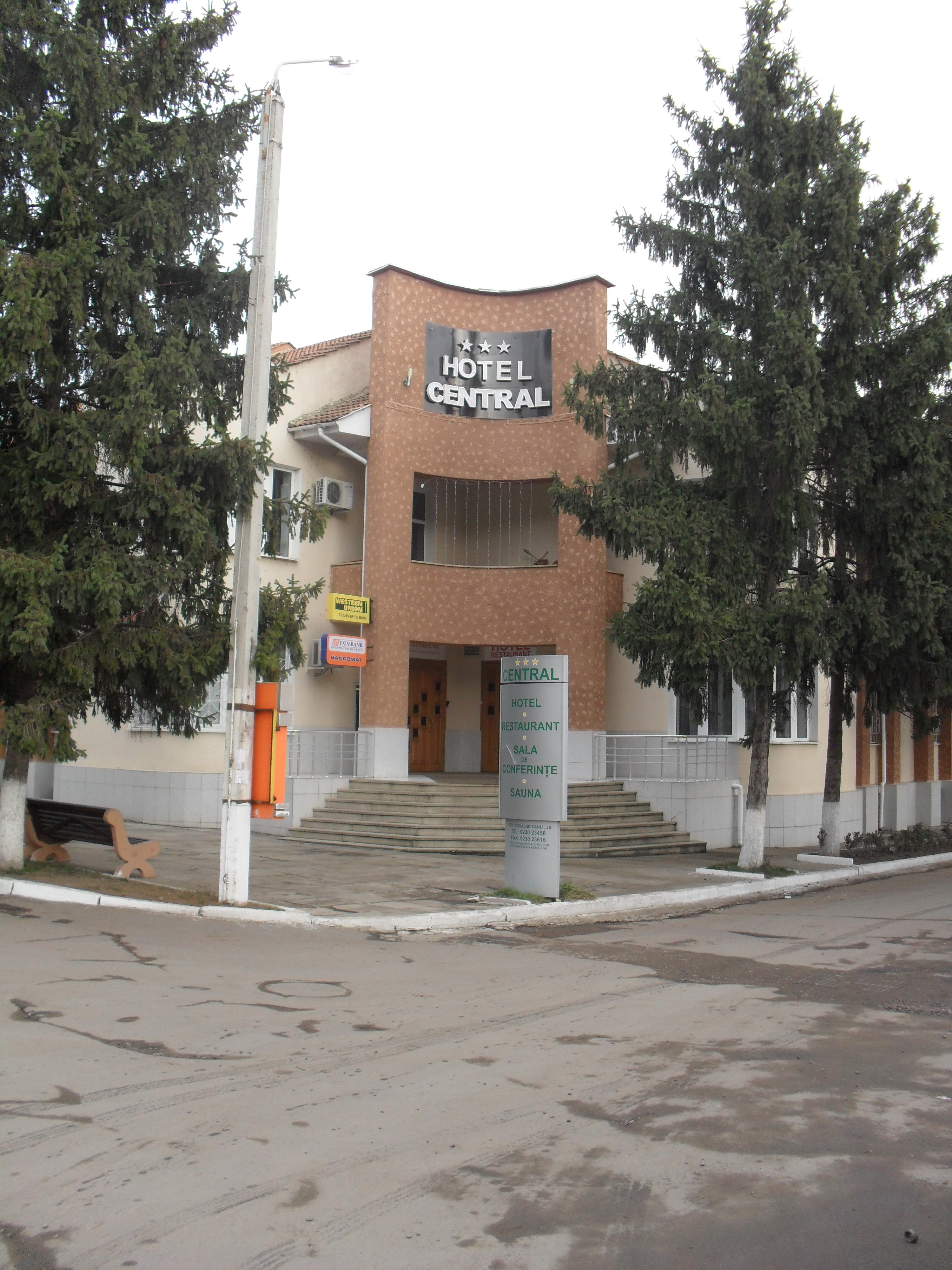 м. Сороки. Готель CENTRAL***